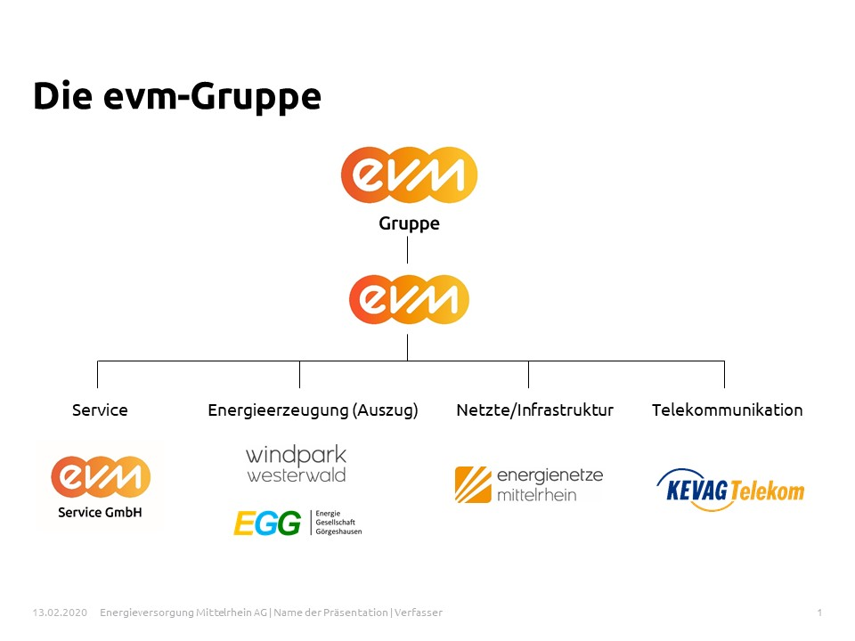 evm-Gruppe